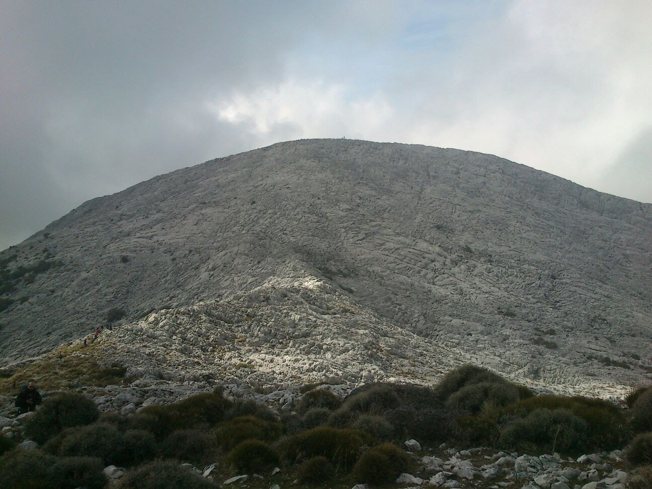 Cima del Pico Simancón vista desde el vecino Pico Reloj en Febrero 2017.